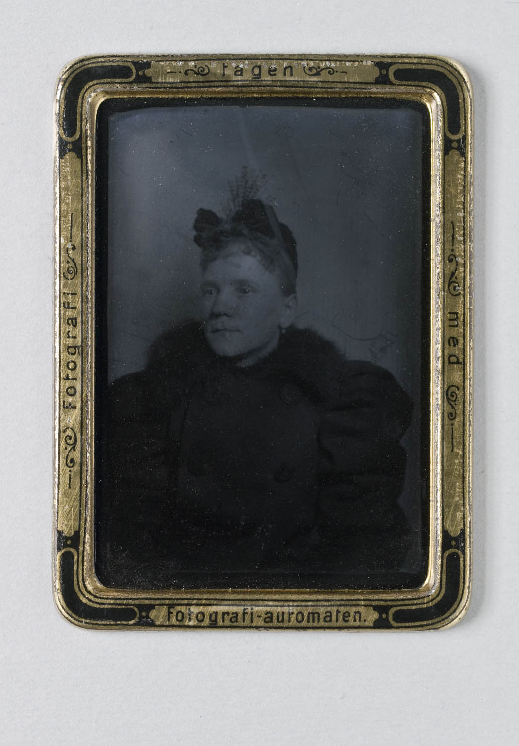 Porträtt av dam i ytterkläder och hatt, uppfäst på en metallplåt; på dess baksida bild av Industripalatset; inskr. 'Minne av Industripalatset' / 'Fotografi tagen med fotografiautomaten'; i fodral av vit papp, tryckt text: 'Industripalatset / Stockholm / Fotografi-Automat / Bosco / nyaste uppfinning / Bilden bör icke torka i solen / Bildytan får ej vidröras förrän den är torr.' Ferrotyp. Nordiska museet inv.nr 209788.